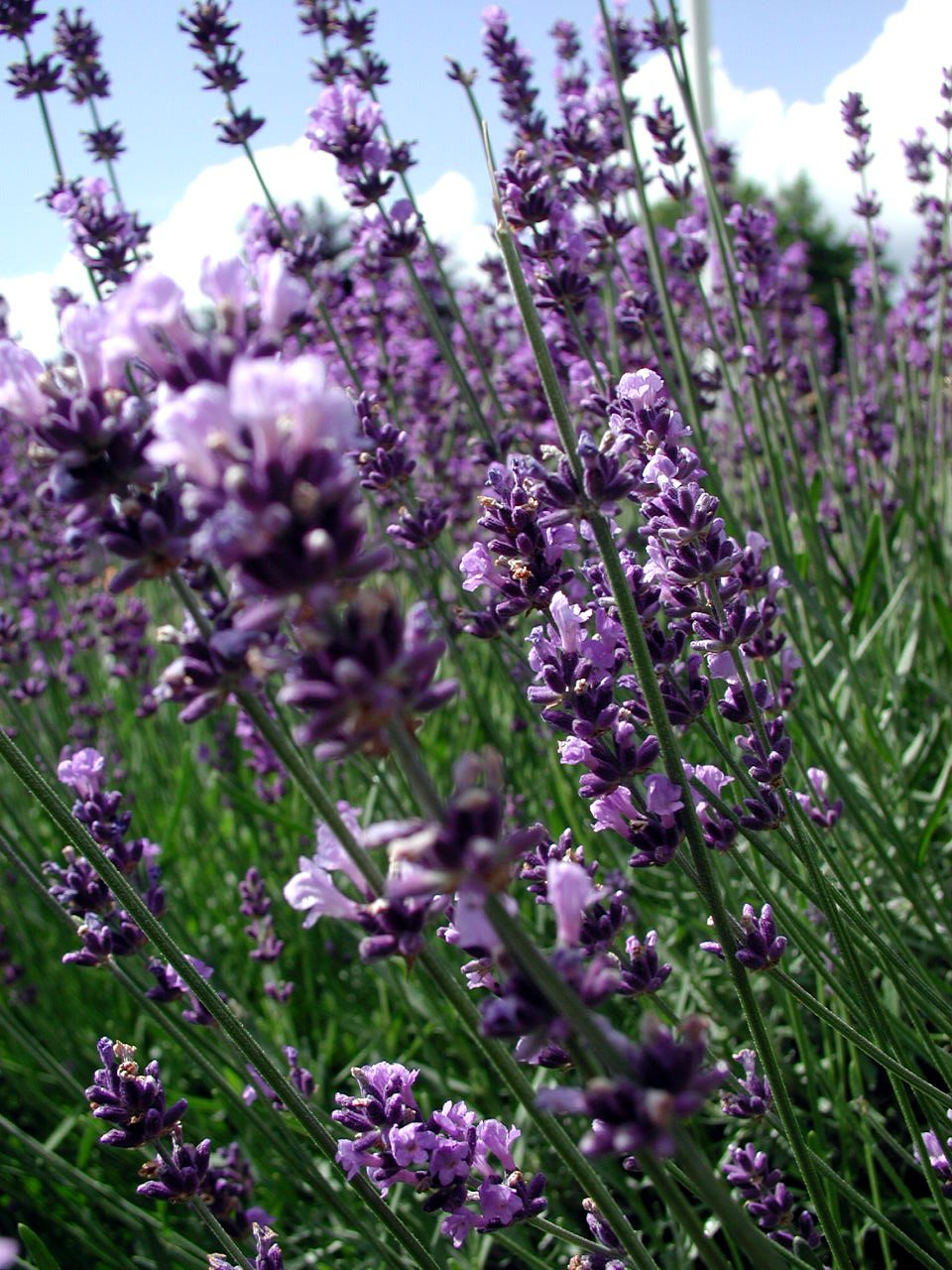 Lavendel (Lavandula sp.)